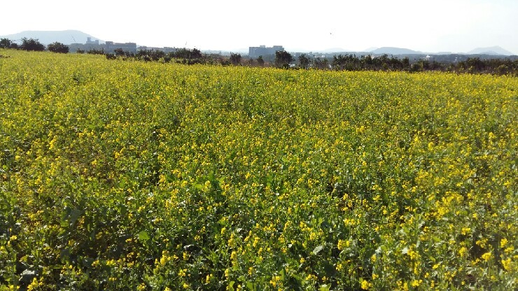 한국어 (조선): 제주도의 유채밭을 촬영